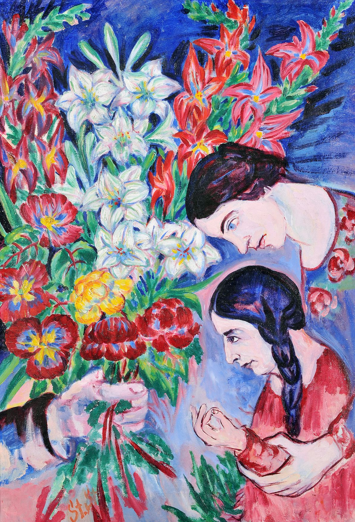 Erzsébet és Felicitas köszöntése. Blumengruss (Bildnis von Elisabeth und Felicitas mit Blumenstrauss). Öl auf Leinwand. Unten links monogrammiert, verso Nachlassstempel des Künstlers, Inventurstempel der Gemeinde Dornach, sowie Etikett mit einem Verweis auf die Ausstellung in Wiesbaden. 85,3×59,8 cm.